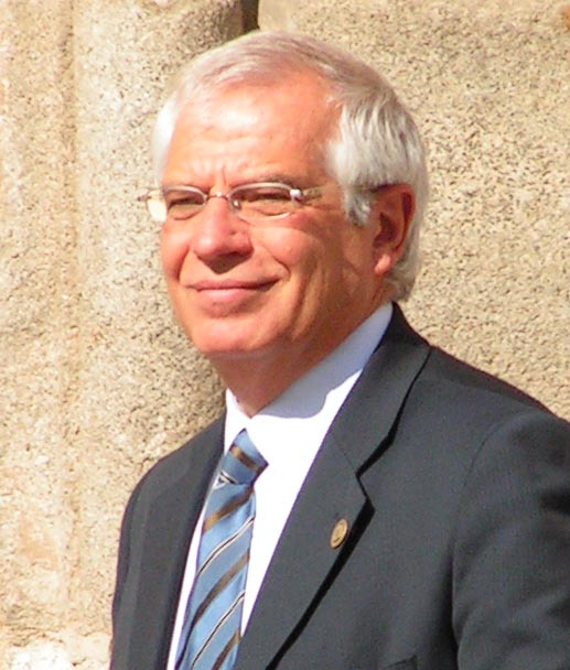 Josep Borrell, presidente del Paramento Europeo, en la XV Cumbre Iberoamericana que tuvo lugar en Salamanca (España), en octubre de 2005.